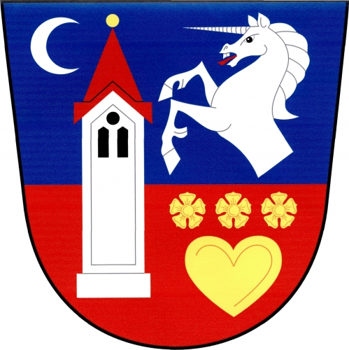 znak, Radkova Lhota, okres Přerov